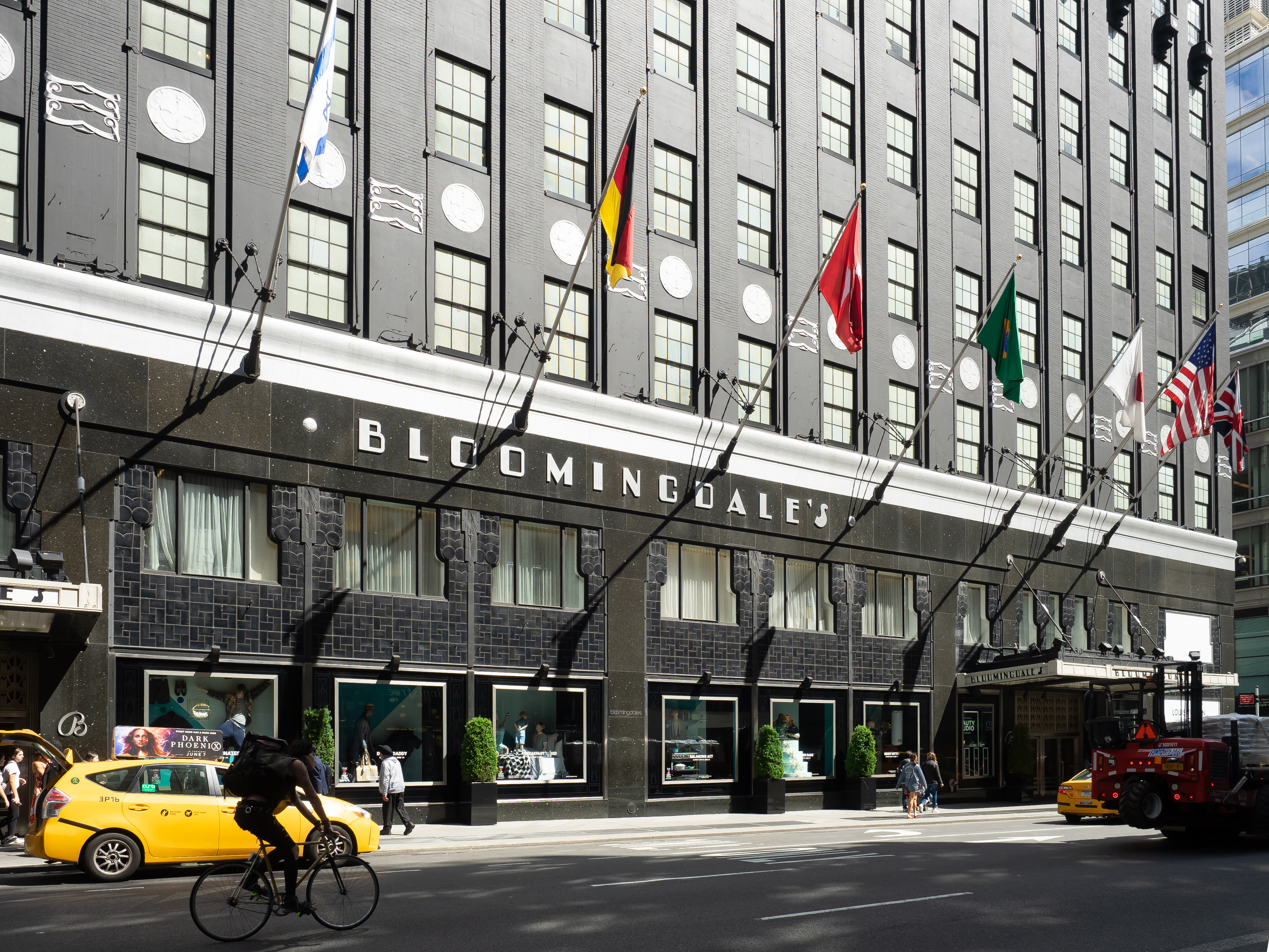 Upper East Side, NYC